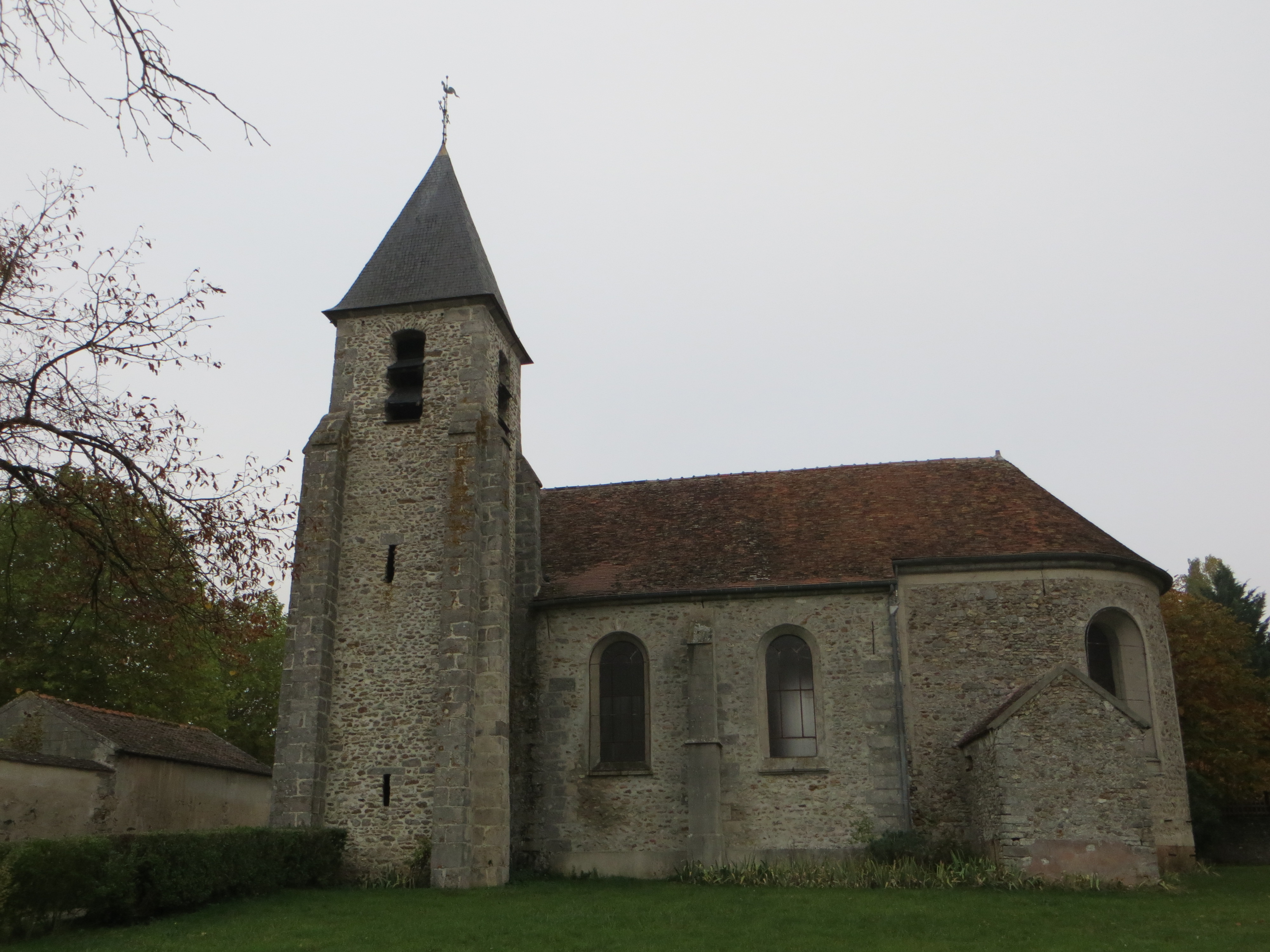 Vue générale de l'église